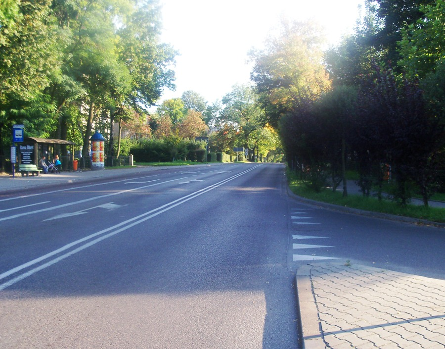 ulica Piotrowicka w Katowicach - widok w kierunku południowym